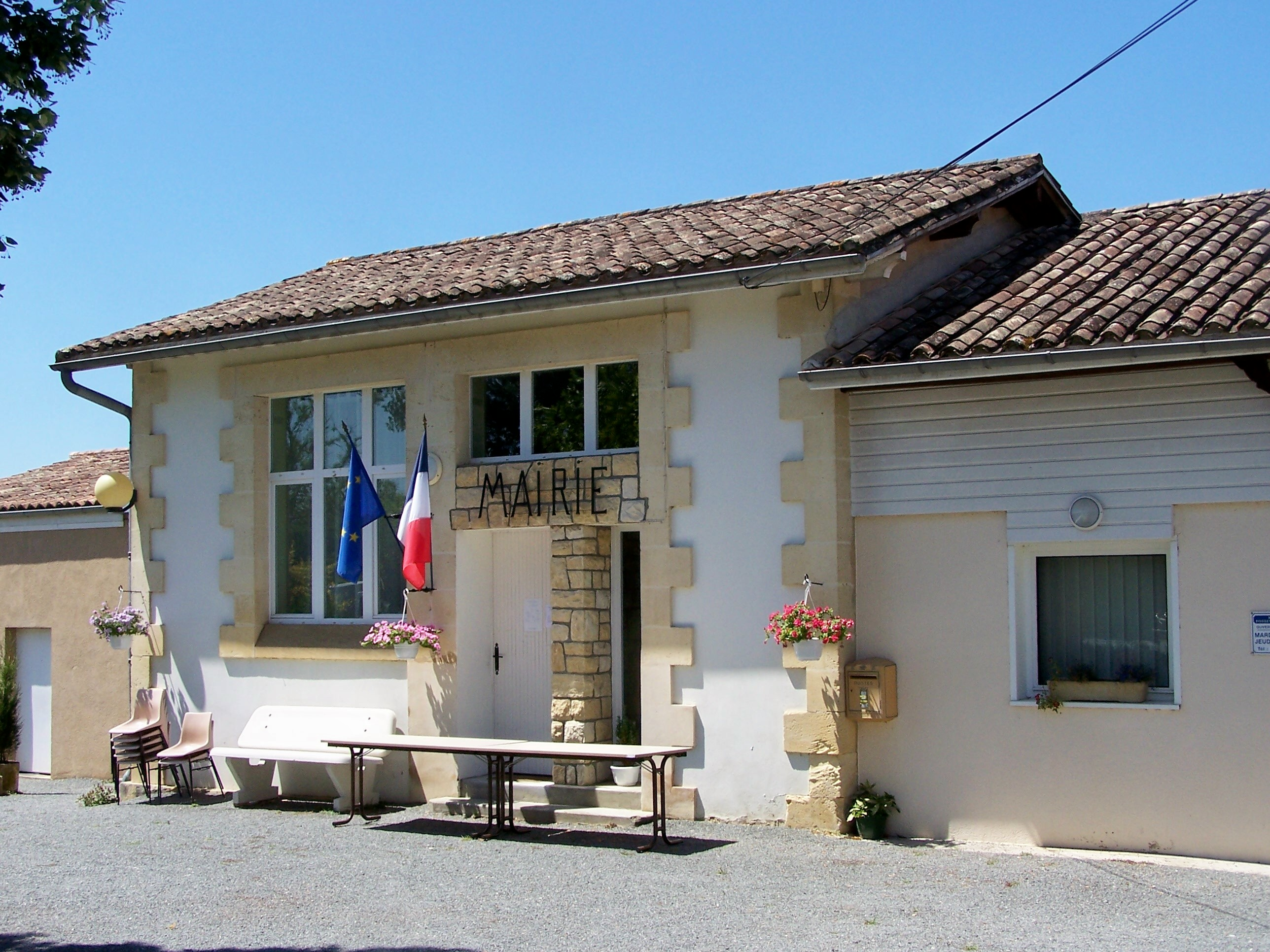 Mairie de Fossès-et-Baleyssac, Gironde, France